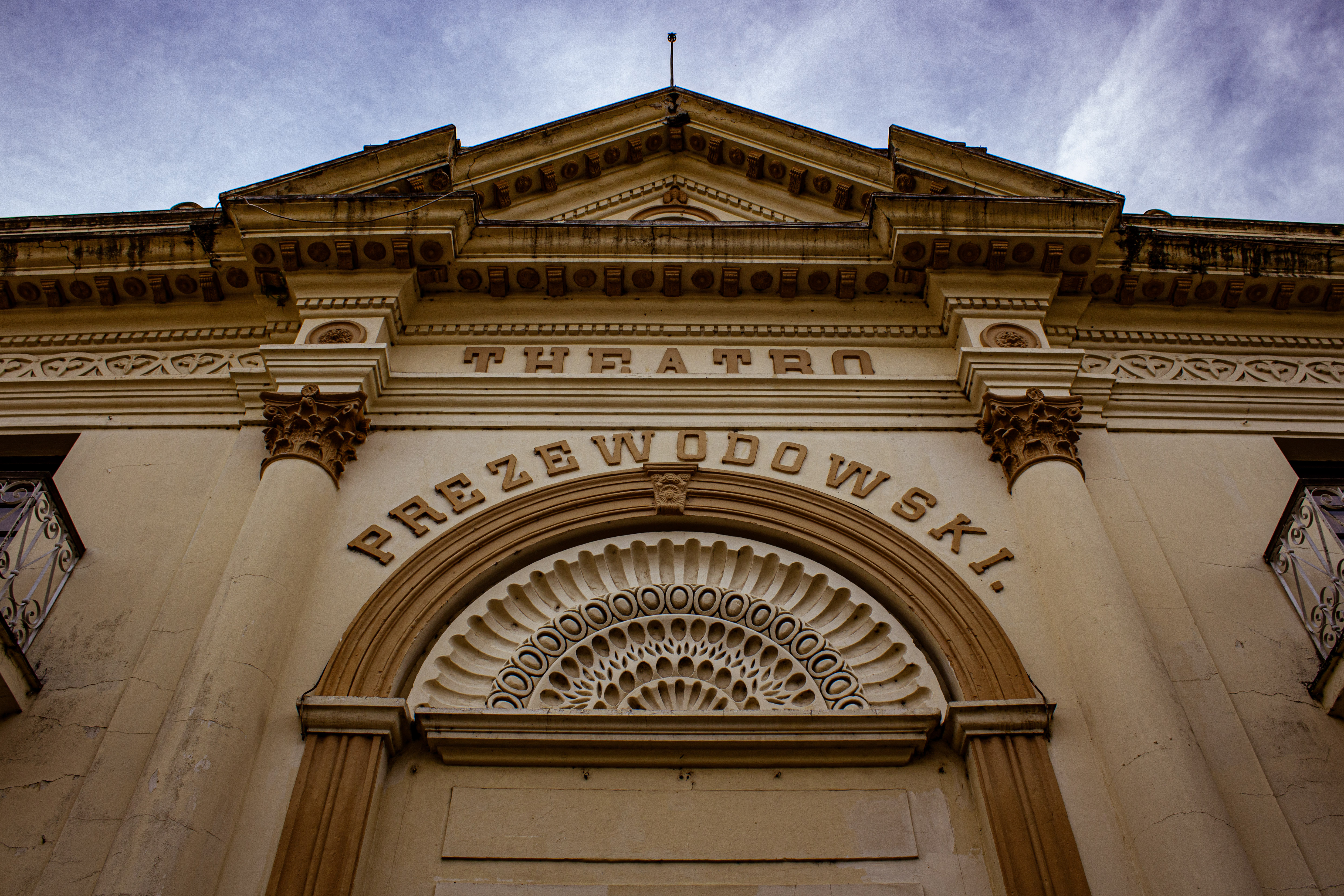 Detalhes da arquitetura com características neoclássicas, na faixada do Teatro Prezewodowski. Cultural propertyTeatro Prezewodowski, Itaqui, Rio Grande do Sul, Brazil Q3527536, P727: iPatrimônio ID: itaqui-teatro-prezewodowski